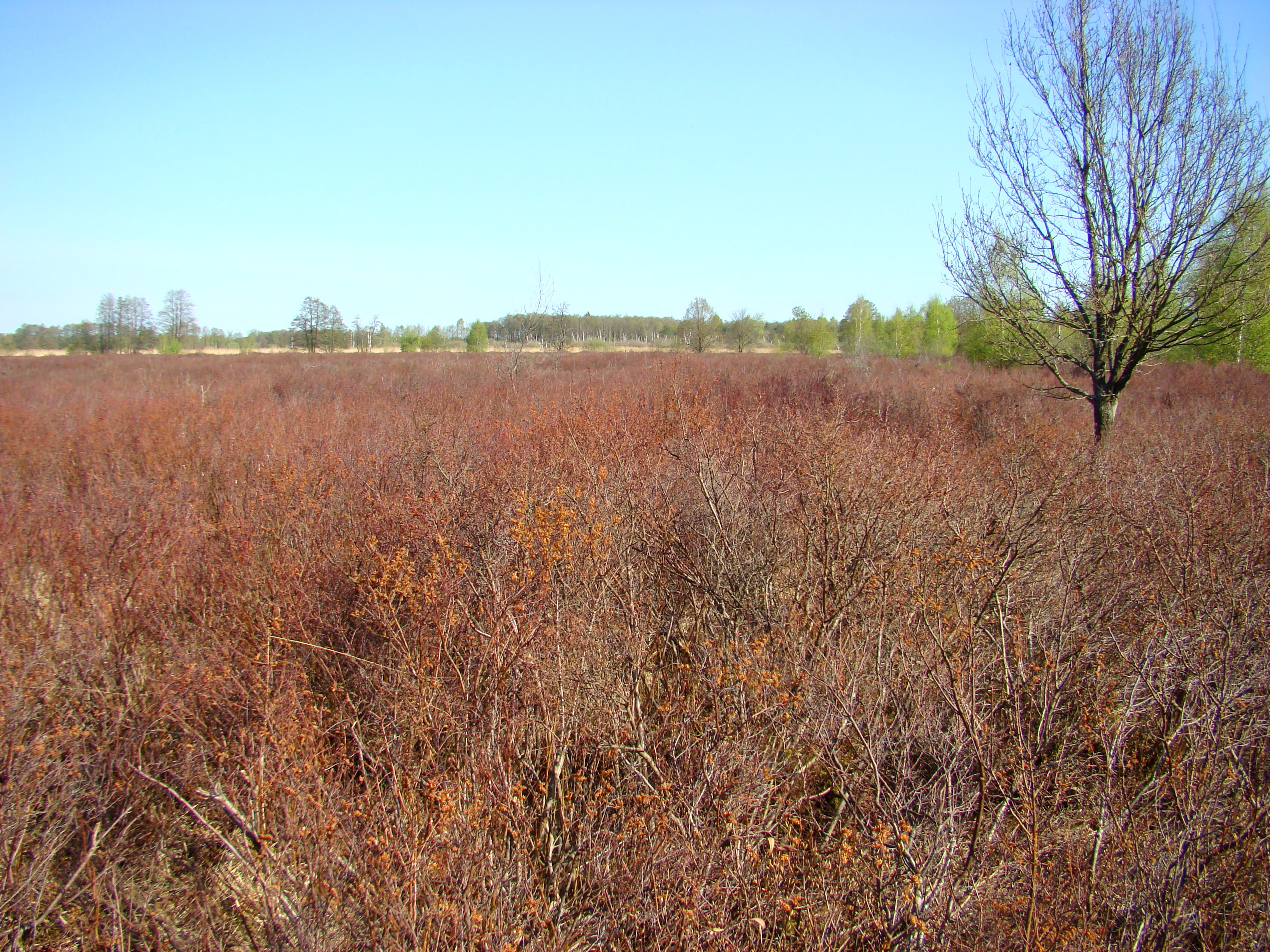 Gagelstrauchbestand (Myrica gale) im Bannetzer Moor